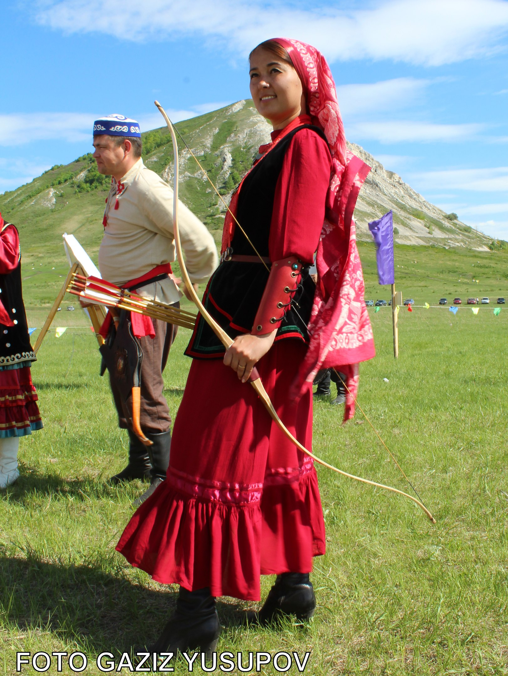 Башҡортса: Юрматы йыйыны 2017, Ишембай районы, Торатау, Башҡортостан